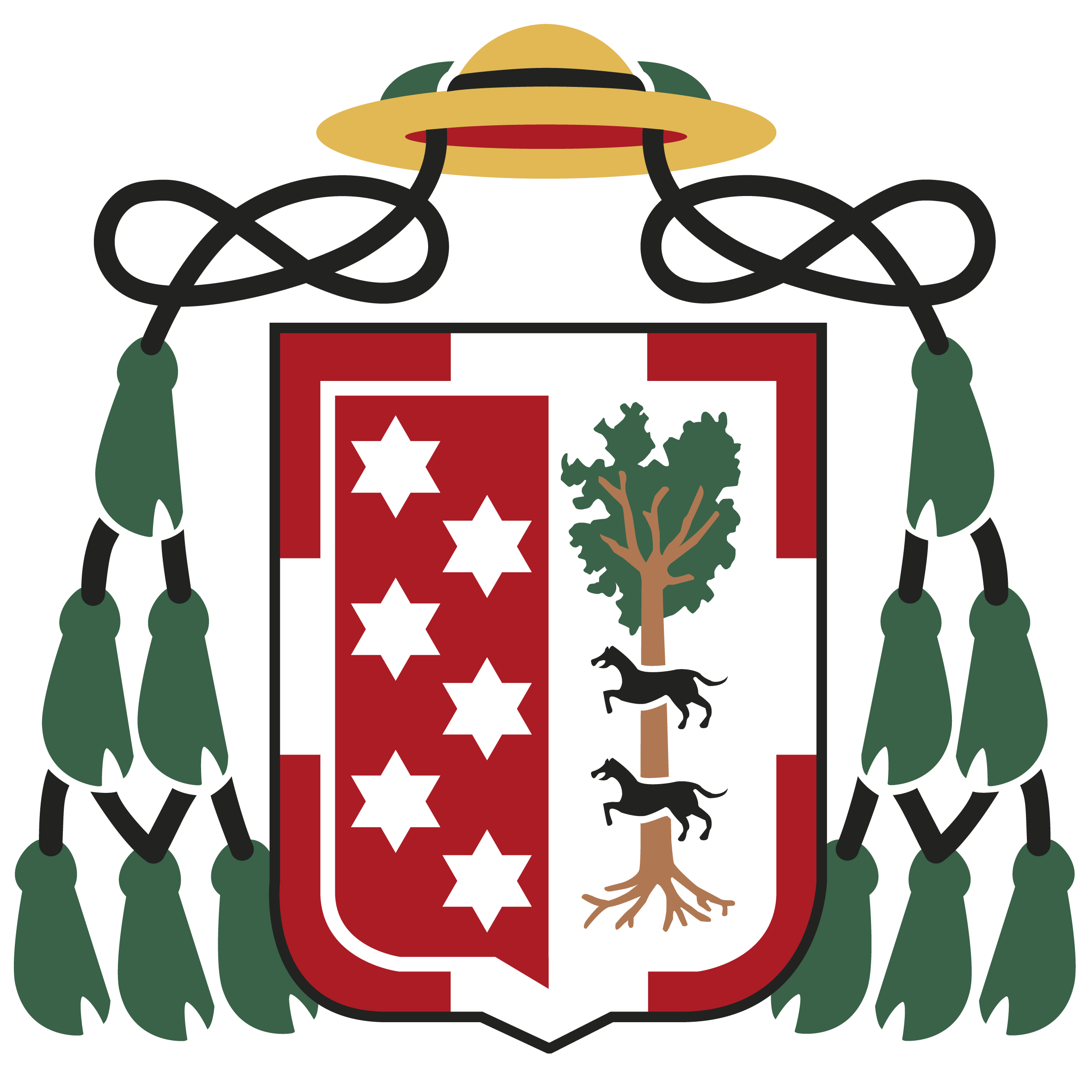 Escudo del Colegio Mayor Diego de Covarrubias